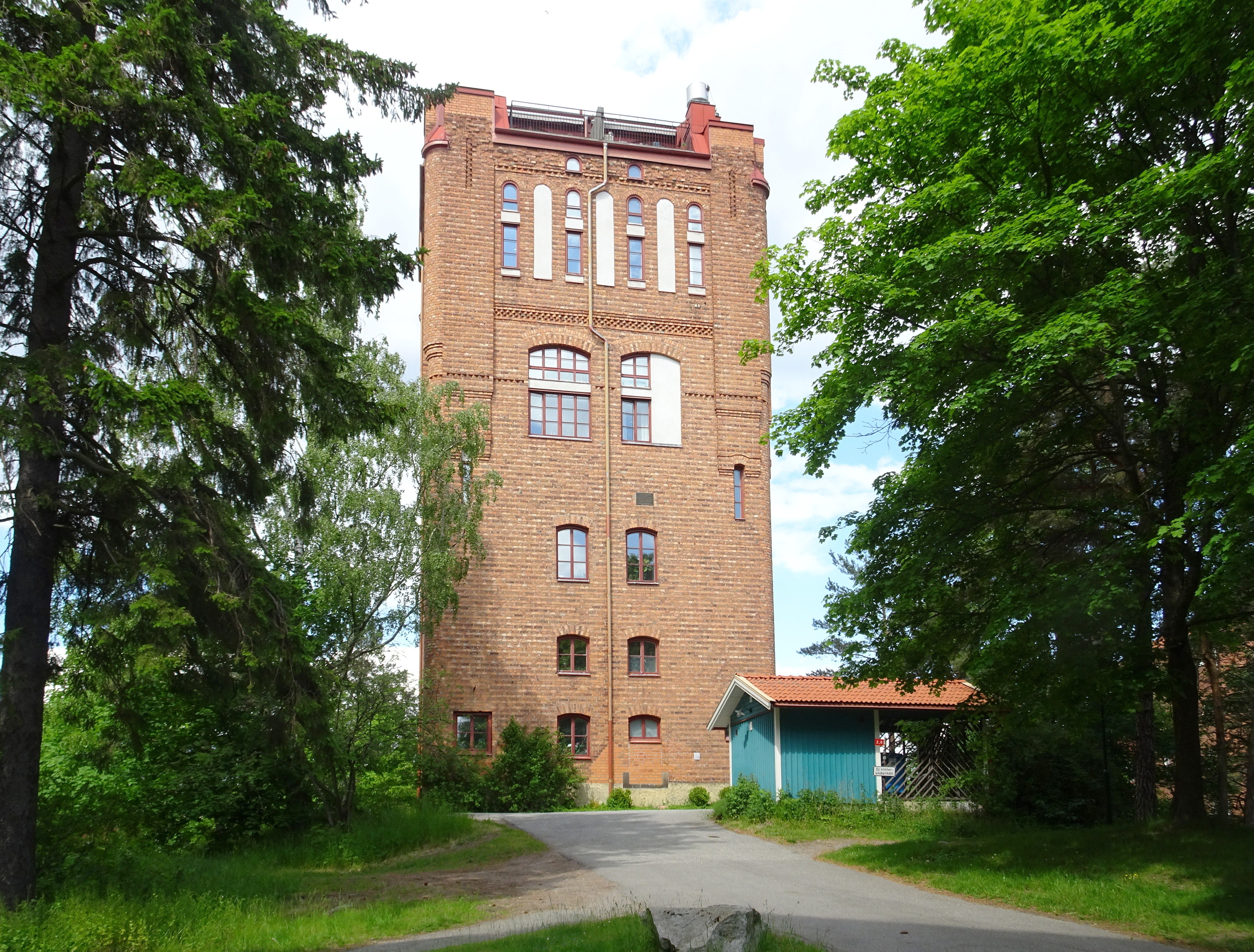 Råsunda Vattentorn invigd 1910, arkitekt Sigge Cronstedt